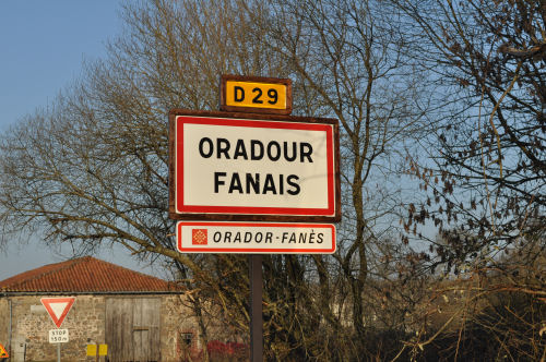 Panneau bilingue à Oradour-Fanais (Charente, France).